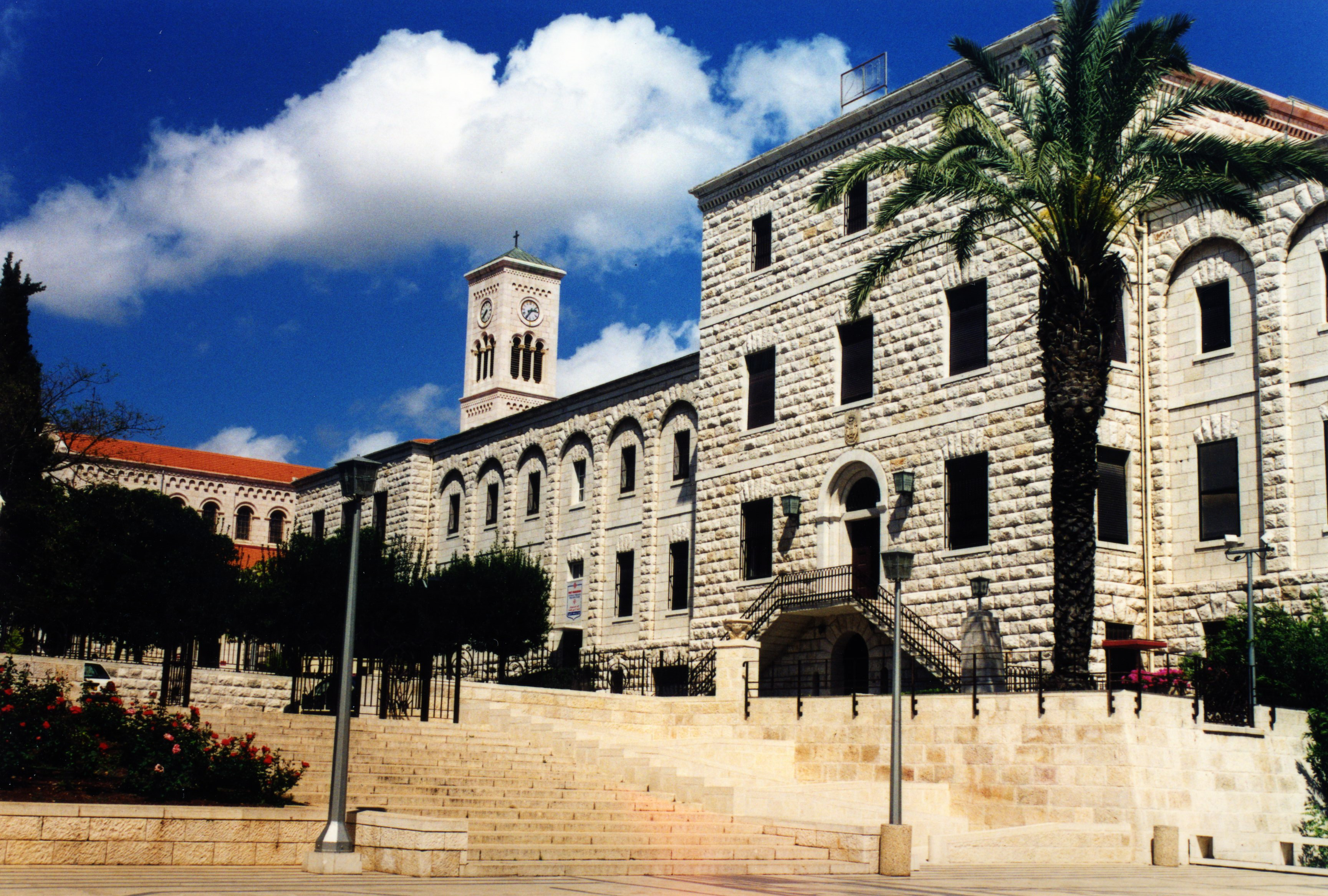 Picture taken in Nazareth (Israel) Wikipedia contributor: Solal